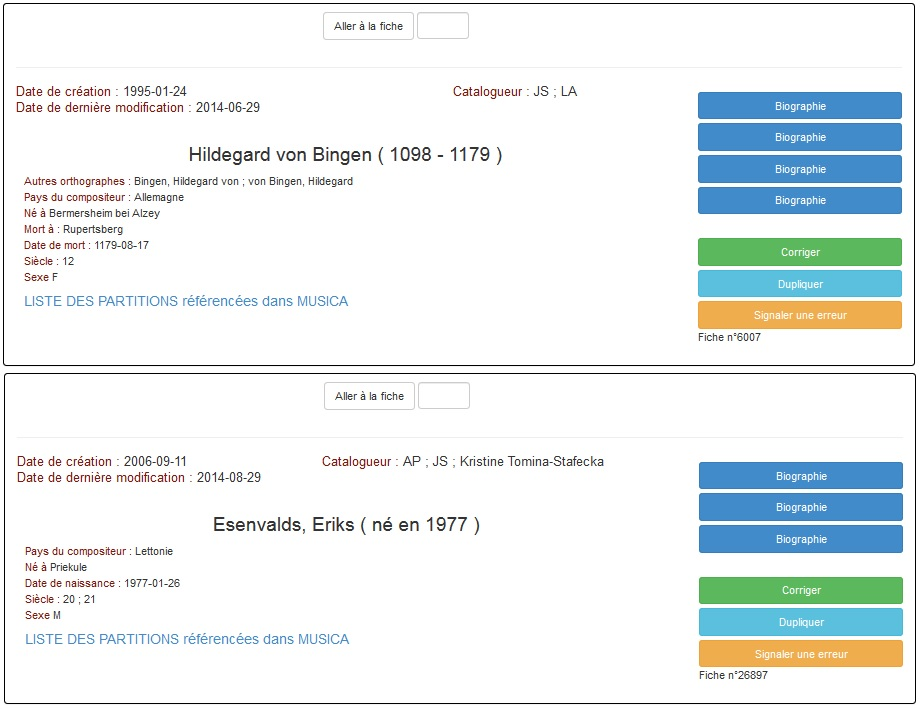 Visuel de deux fiches biographiques de compositeurs dans la base de données Musica International : Hildegard von Bingen et Eriks Esenvalds